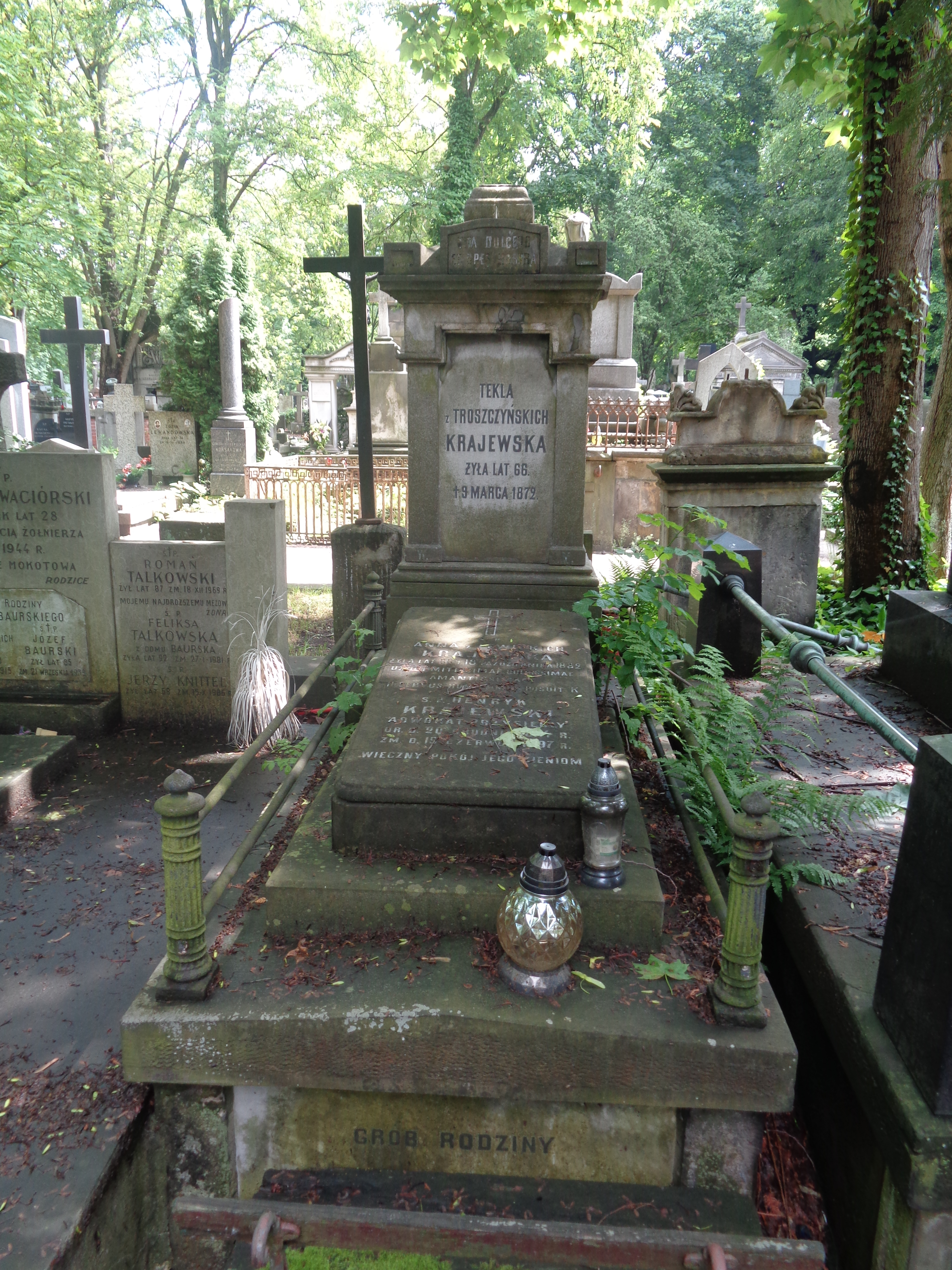 Grób Henryka Krajewskiego na Cmentarzu Powązkowskim